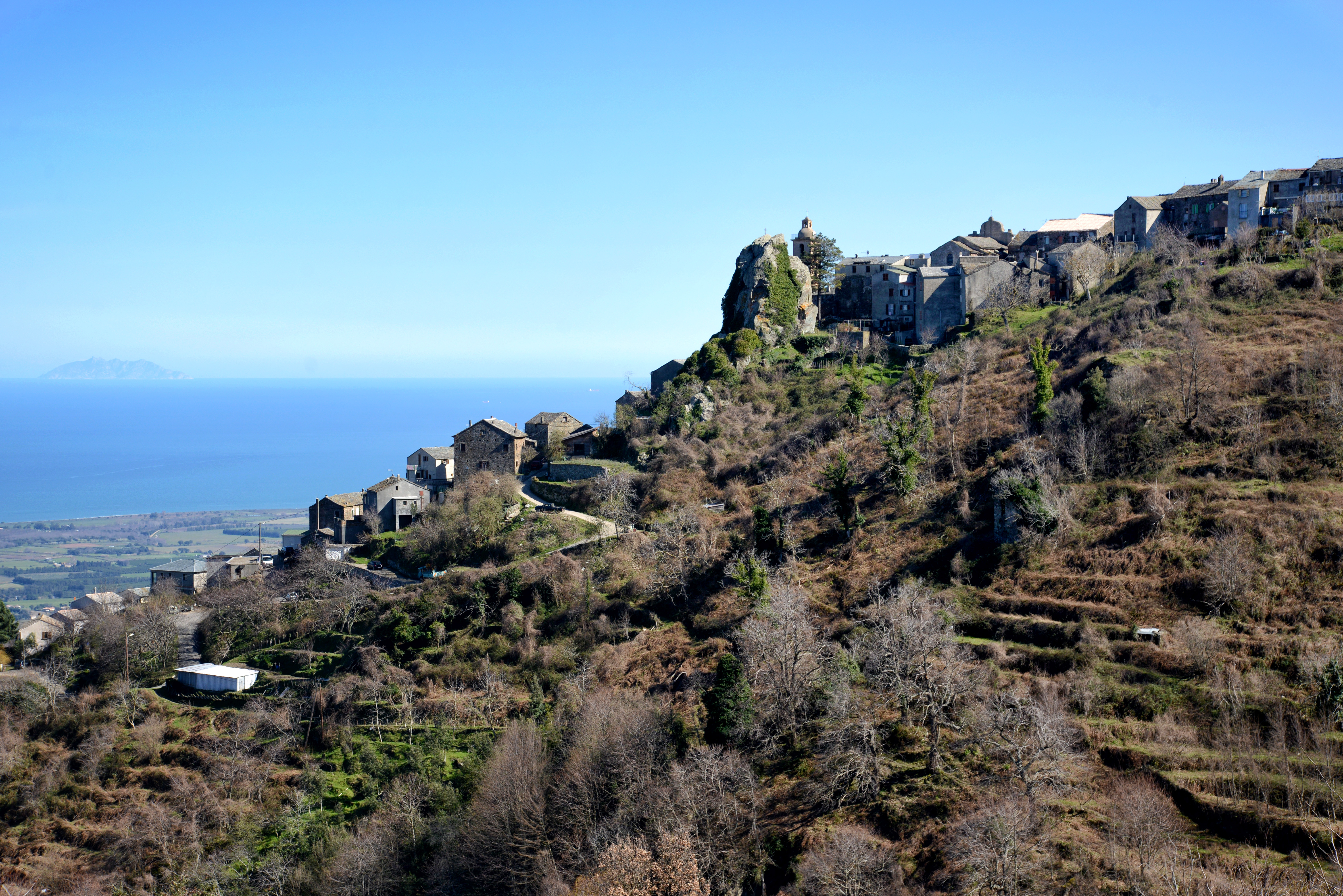 Loreto-di-Casinca (Corse) - Nid d'aigle de la Casinca, telle une citadelle ("U pinzale di a Casinca"). Sur l'horizon, l'île de Montecristo